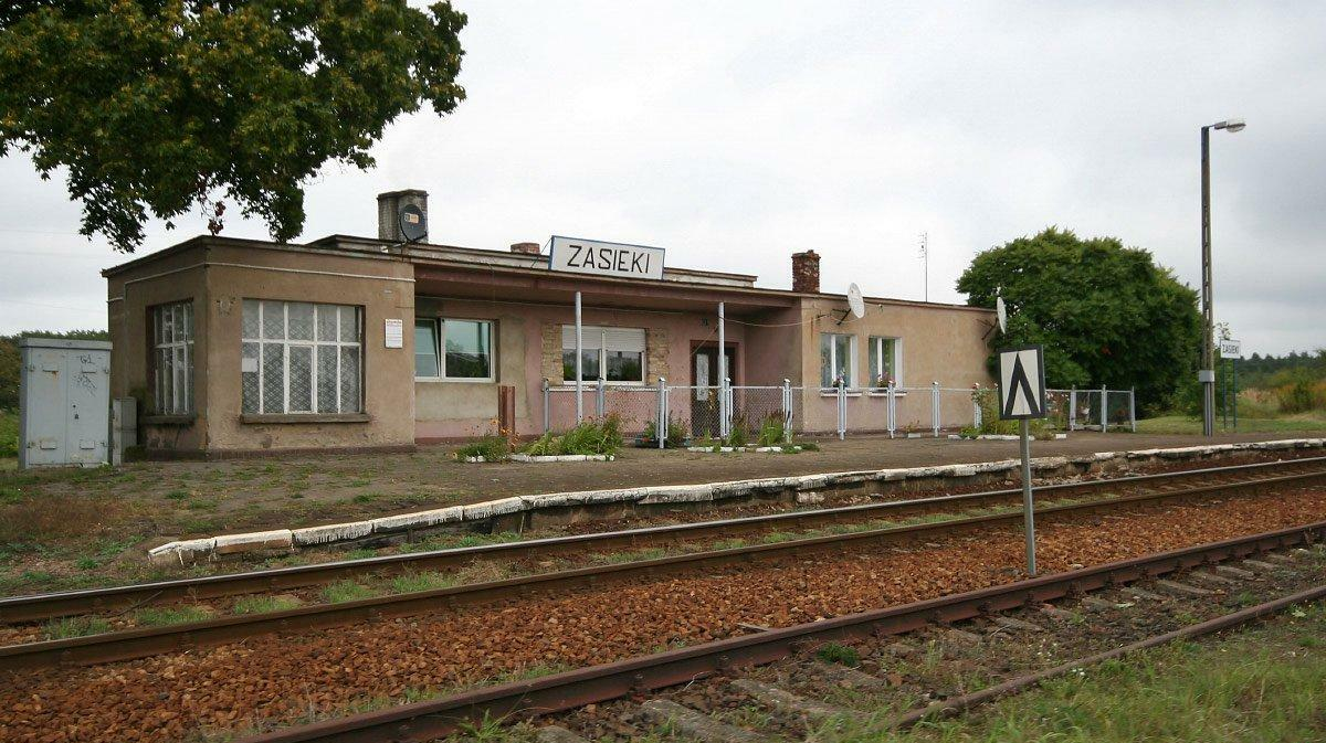 Parterowy budynek na przystanku kolejowym wydaje mi się, że przedwojenny - przenikające się modernistycznie bryły, detal w postaci ceglanego cokołu, wysunięty gzyms - w latach powojennych tak nie budowano.